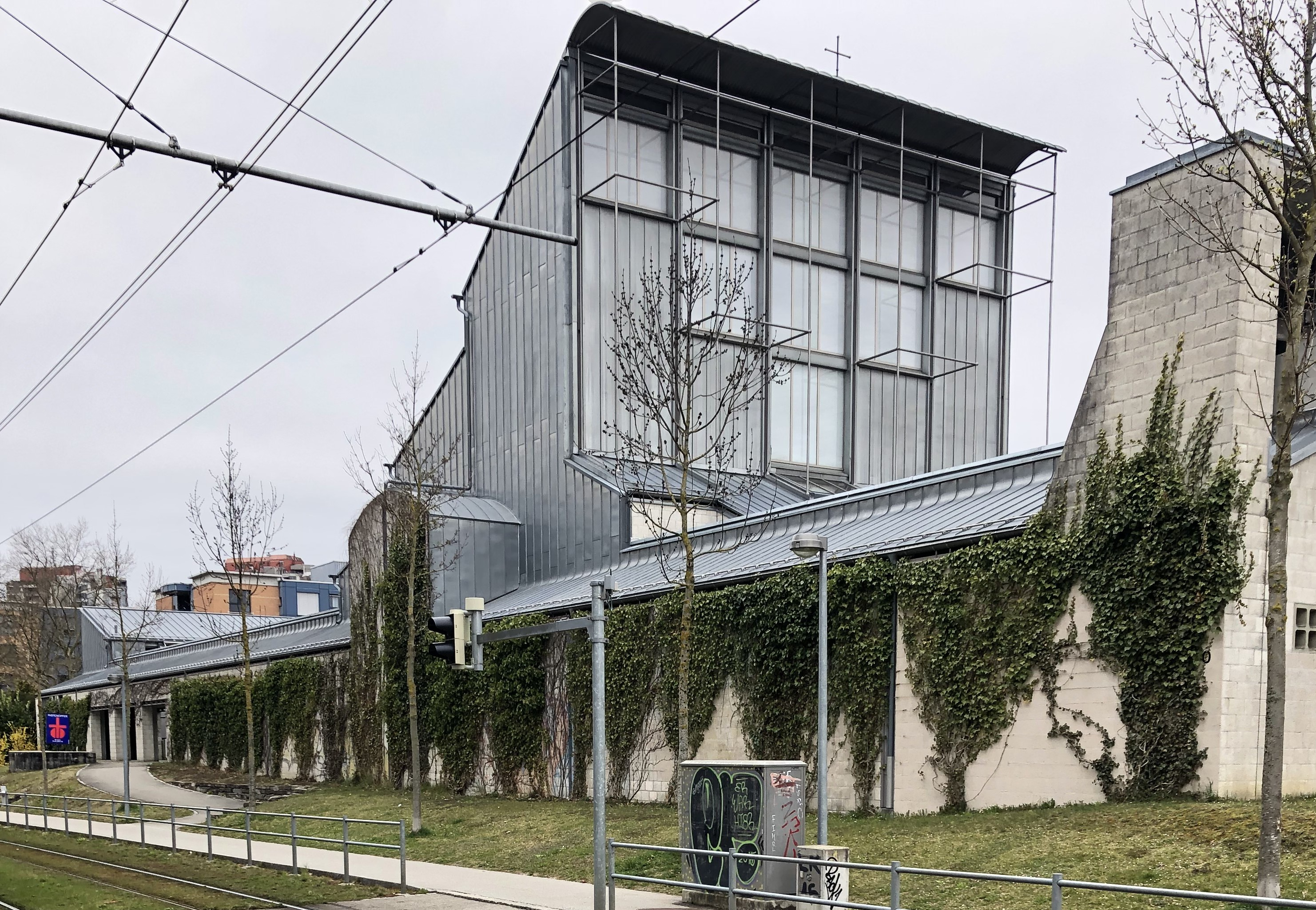 Ackerli Katholische Pfarrei St. Mauritius